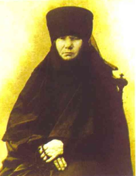 Инокиня Мария (в миру Анастасия Керов), духовный лидер "беседников", основательница Раковской общины, в дальнейшем преобразованной в Раковский Свято-Троицкий монастырь